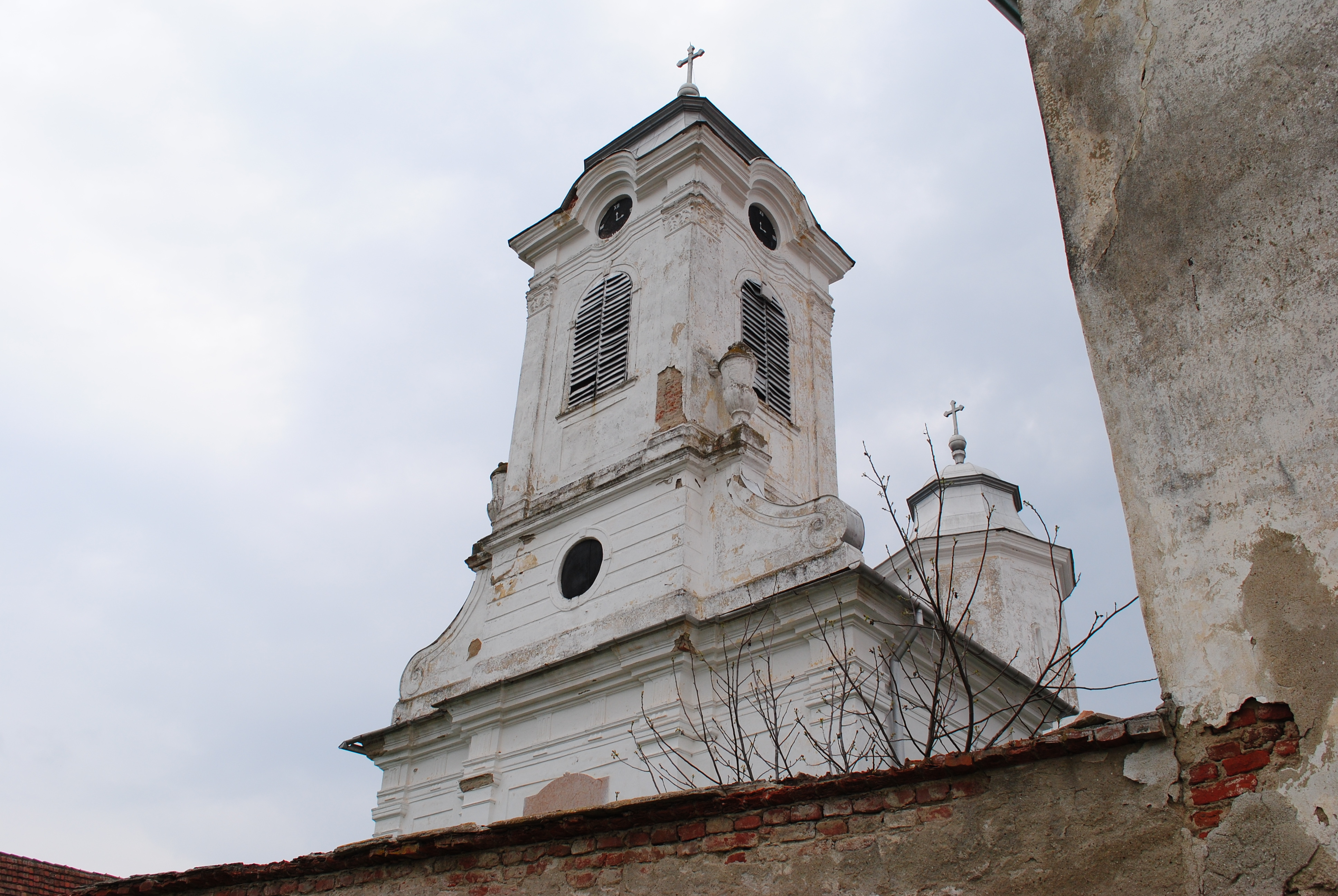 Mănăstirea sârbească Bezdin, sec. XVIII - înc. sec. XIX